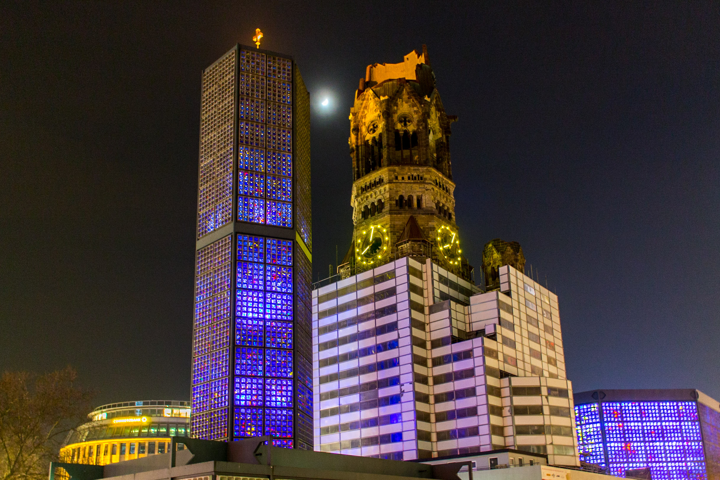 Türme der Gedächtniskirche im Februar 2014